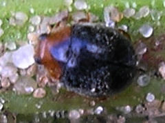 Ladybird of genus Scymnus sp. - small: 2.5 to 3mm maximum. Location: "Boeldershoek", Hengelo (Ov), Netherlands Keywords: Ladybird, ladybug, mealybug, biological pest control --- nl: Lieveheersbeestje uit het geslacht Scymnus sp. - klein: maximaal 2,5 à 3mm. Locatie: Industrieterrein "Boeldershoek", Hengelo (Ov). Trefwoorden: LHB, lieveheersbeest.